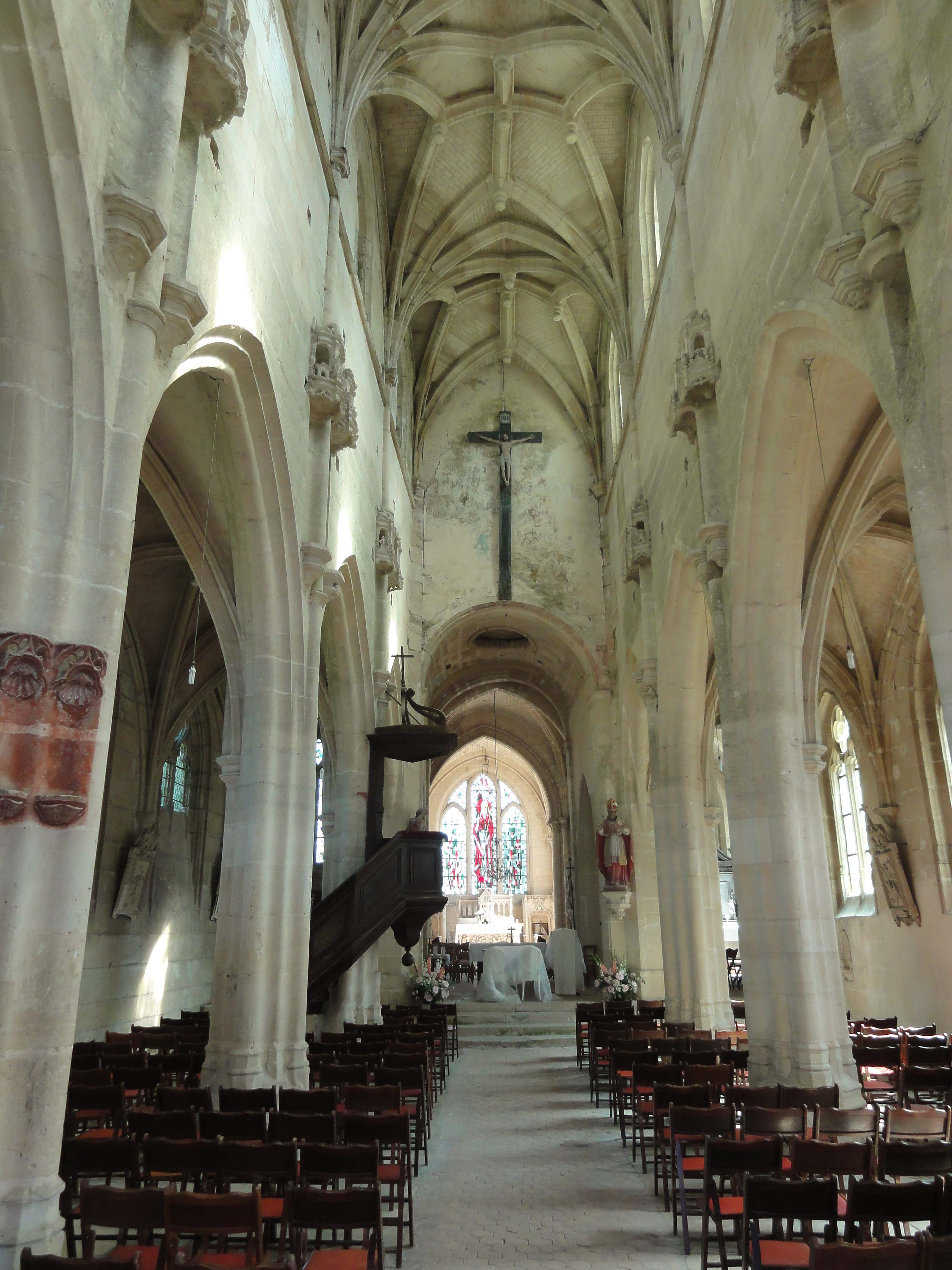 Intérieur de l'église - voir titre.